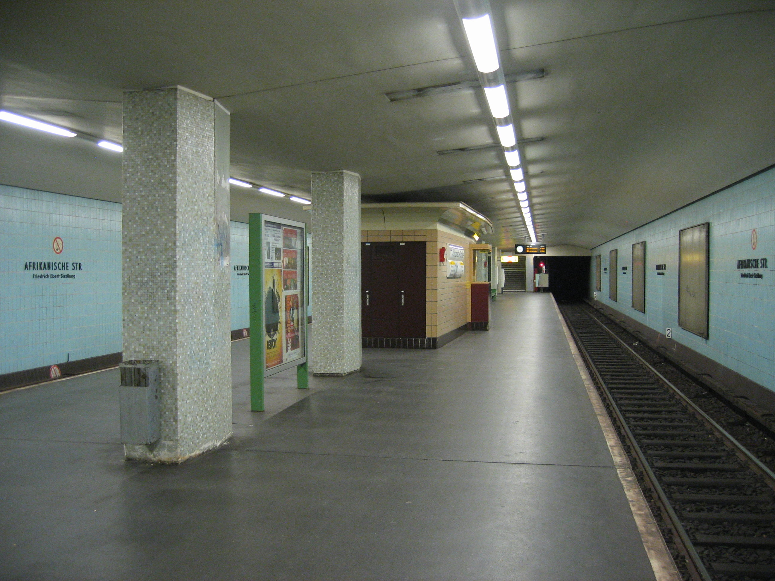 U-Bahnhof Afrikanische Straße, Berlin